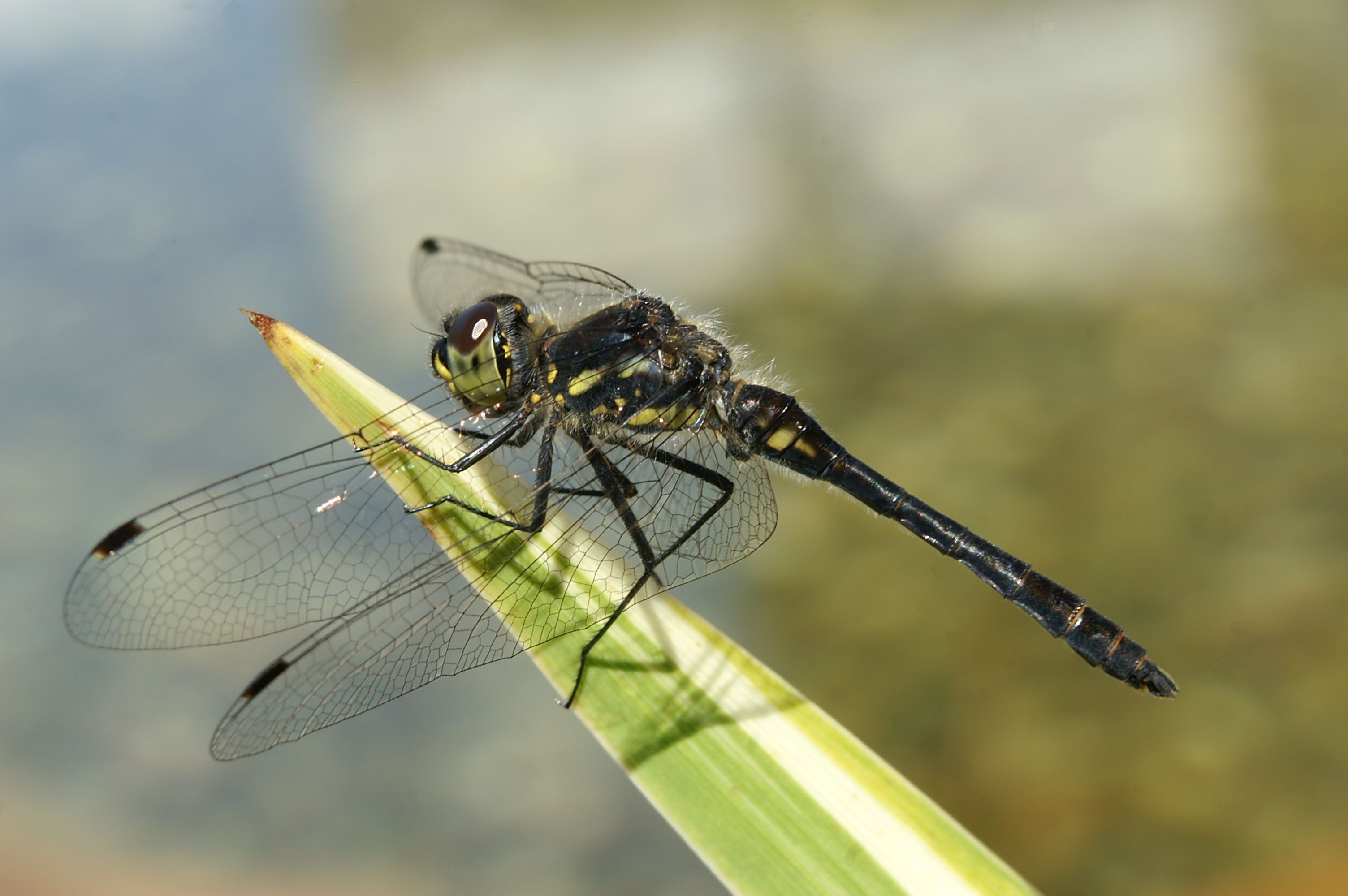 schwarze Heidelibelle, männlich (male)